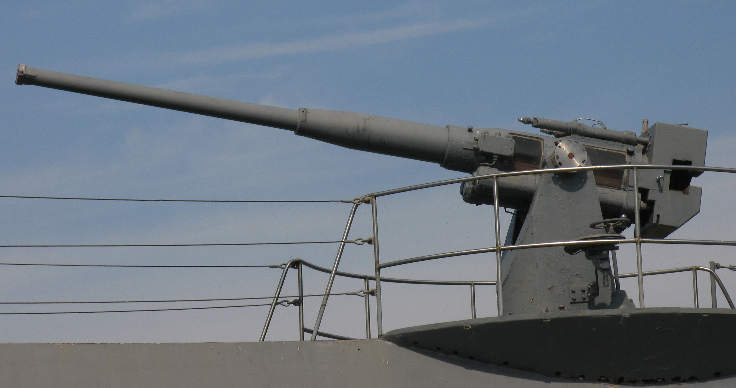 100 мм орудие Б-24 подводной лодки Д-2.